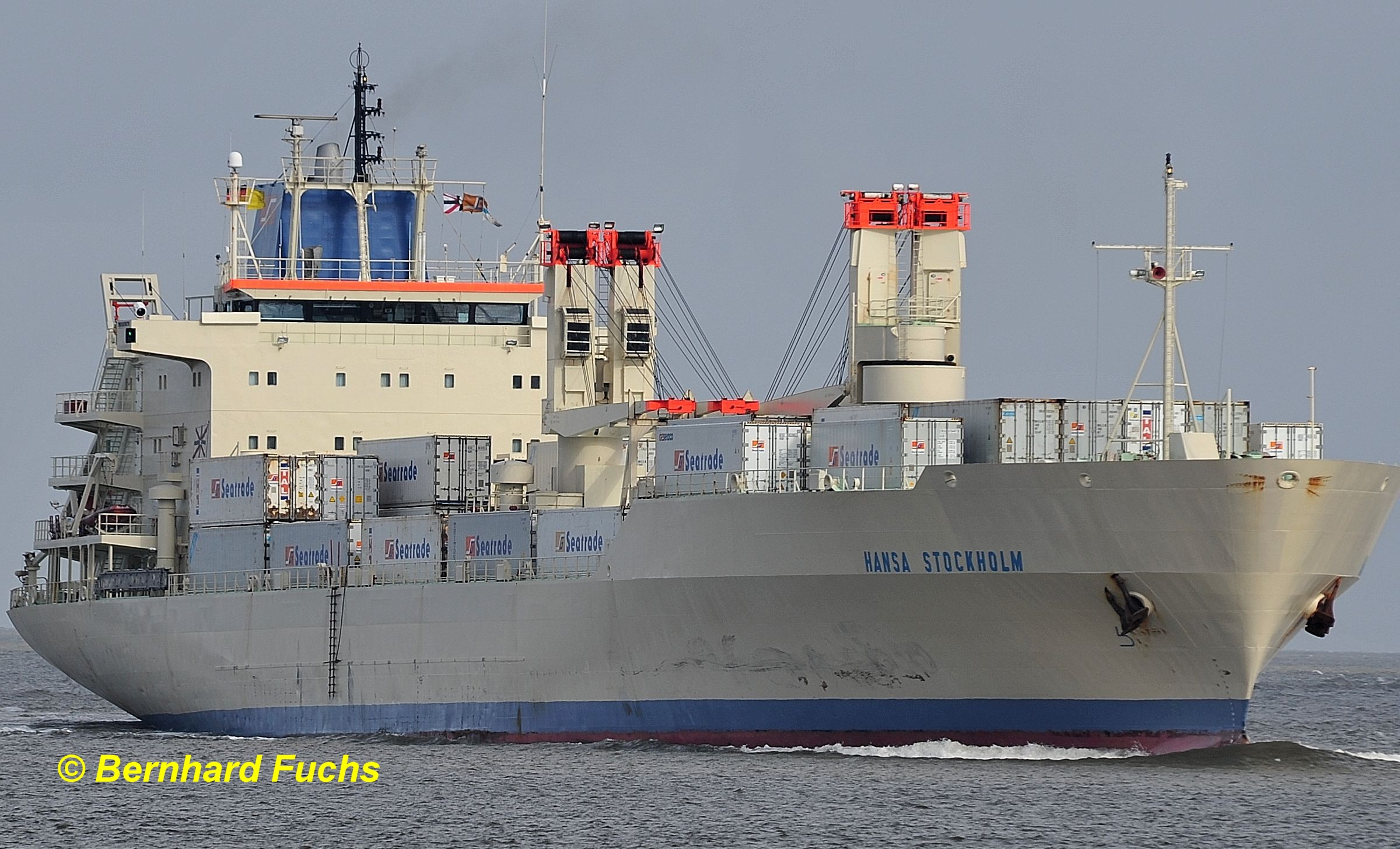 Von See kommend vor Cuxhaven richtung Hamburg fahrend